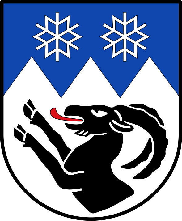 Wappen von Wengen